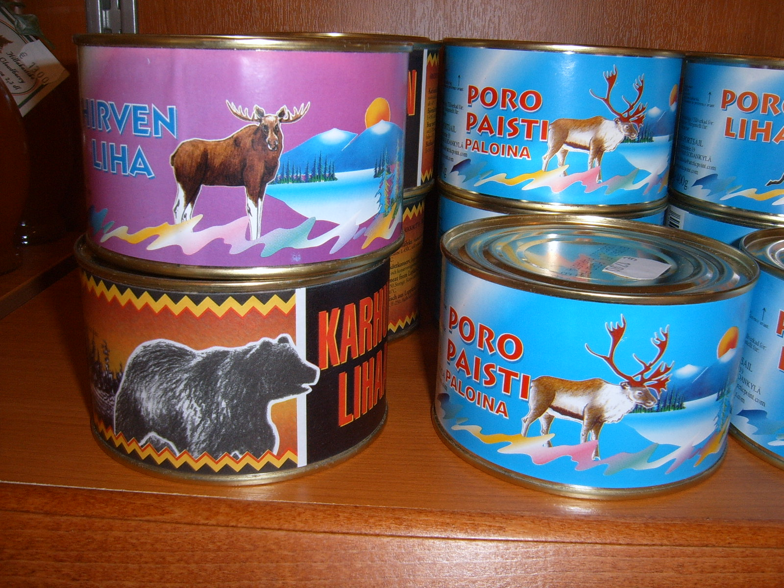 Bear, Reindeer meat, in box. Finland, july 2005 Personal picture, I set it in public domain